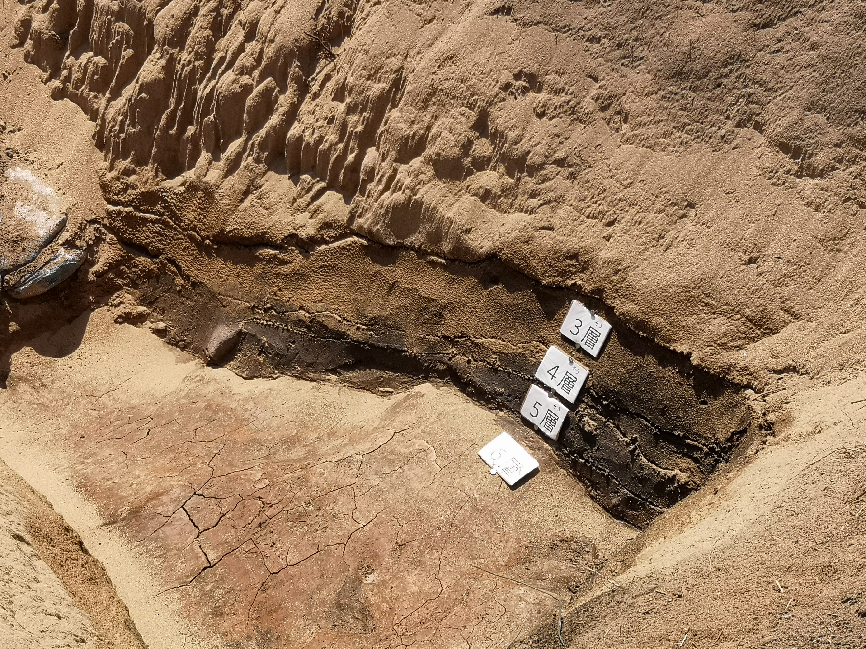 京丹後市網野町浜詰に所在する縄文遺跡「浜詰遺跡」で2019年８月31日に行われた発掘調査見学会。同志社大学の調査による。